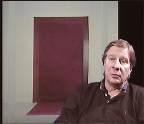 Portrait de Louis Cane